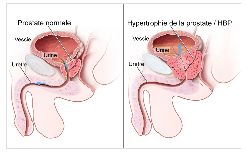 Dessin en 2 parties montrant à gauche l'anatomie normale de l'appareil urinaire masculin et à droite une hypertrophie bénigne de la prostate (HBP) bloquant la vidange vésicale